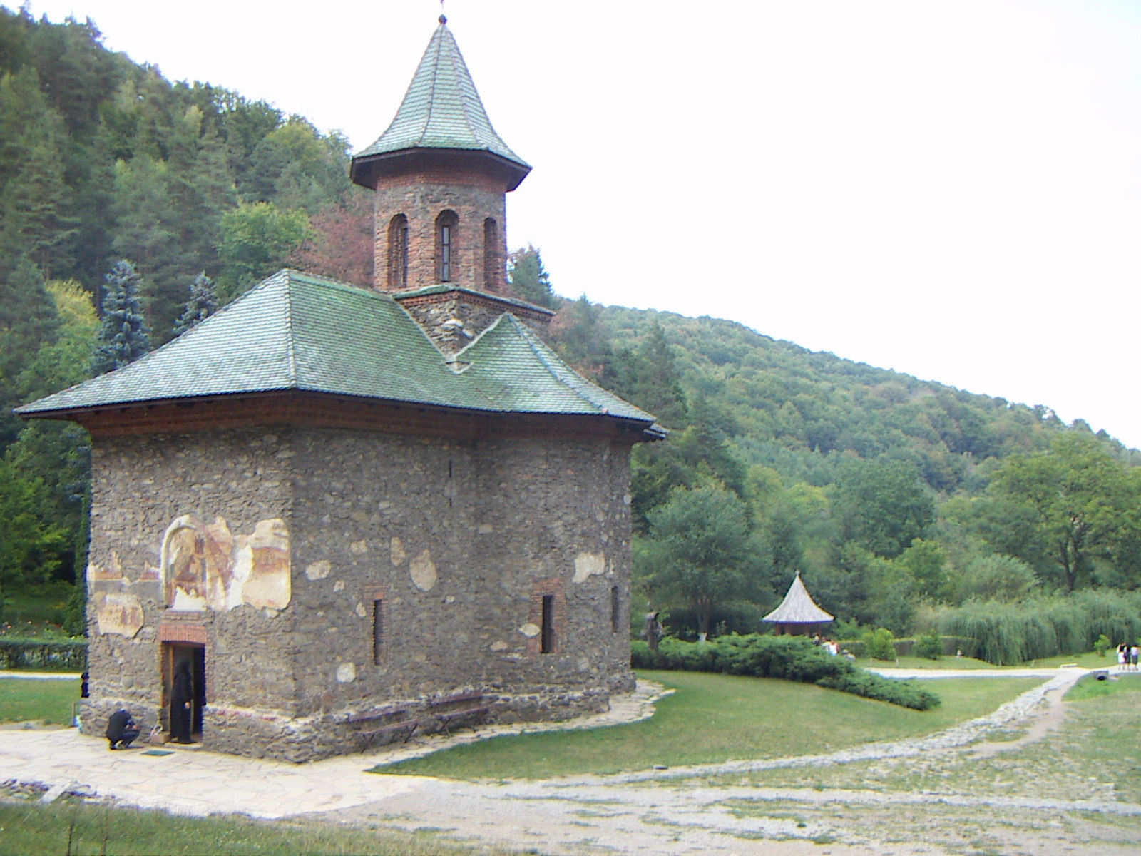 Biserica "Sf. Treime" a Mănăstirii Prislop, din satul Silvaşudesus; 129 la 3 km V de sat oraş Haţeg, construită în 1564, fragmente de pictură murală din 1759